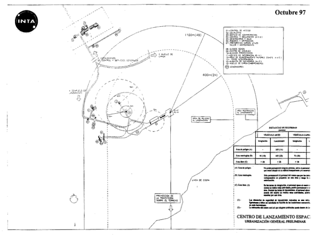 Plano de las instalaciones previstas en el Centro Espacial de El Hierro